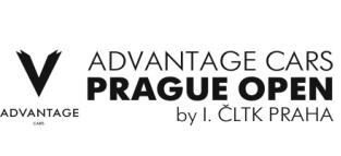 Logo der Advantage Cars Prague Open